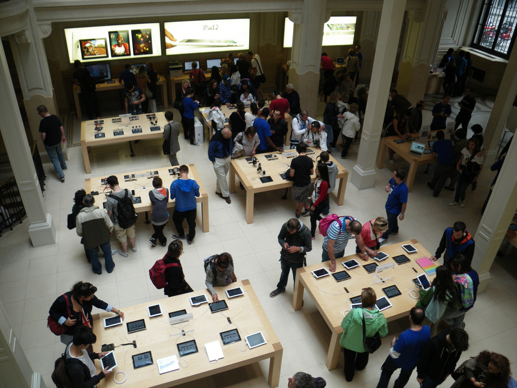 Apple Store, Opéra